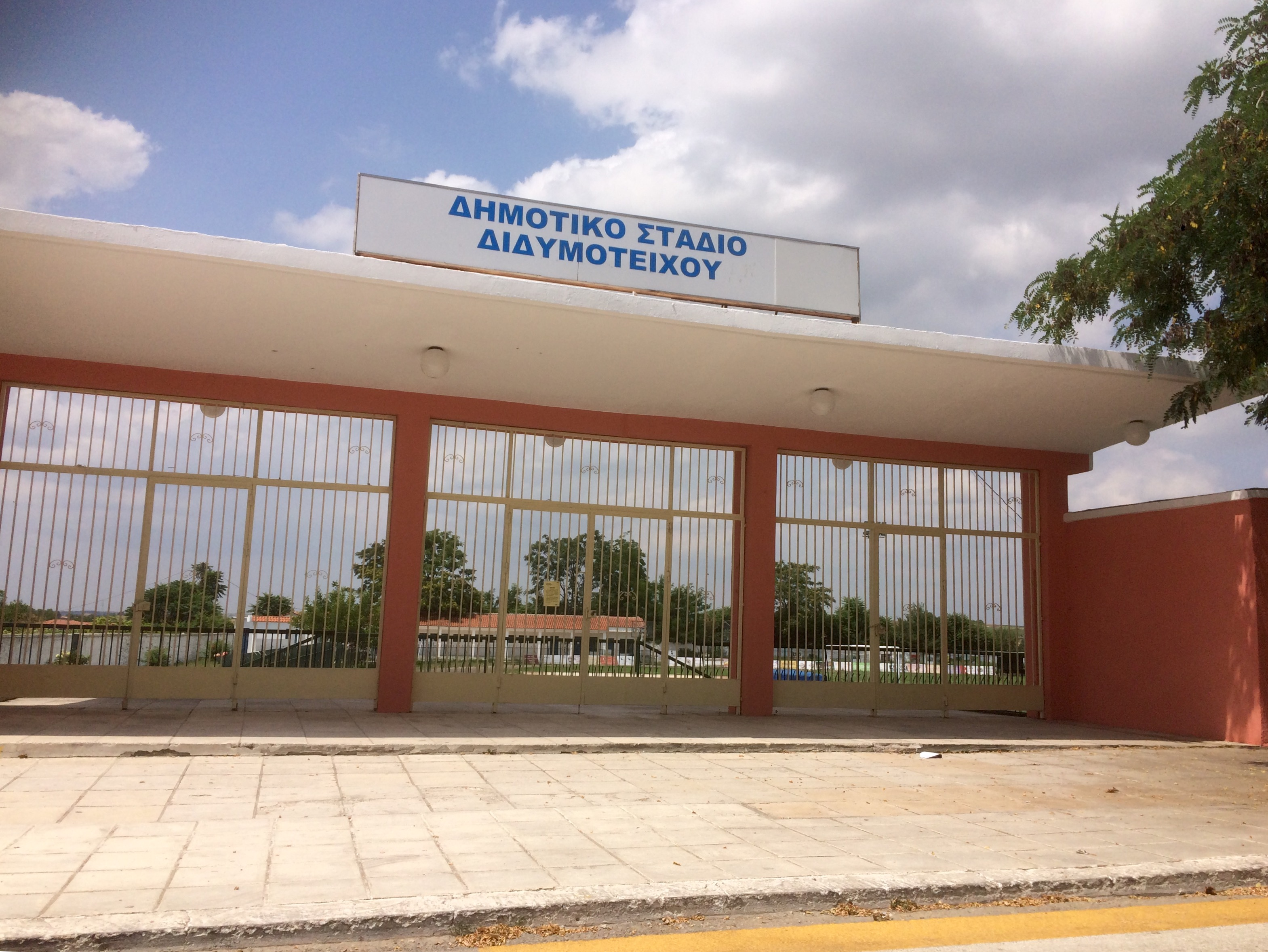 Spielstätte des A.E.D